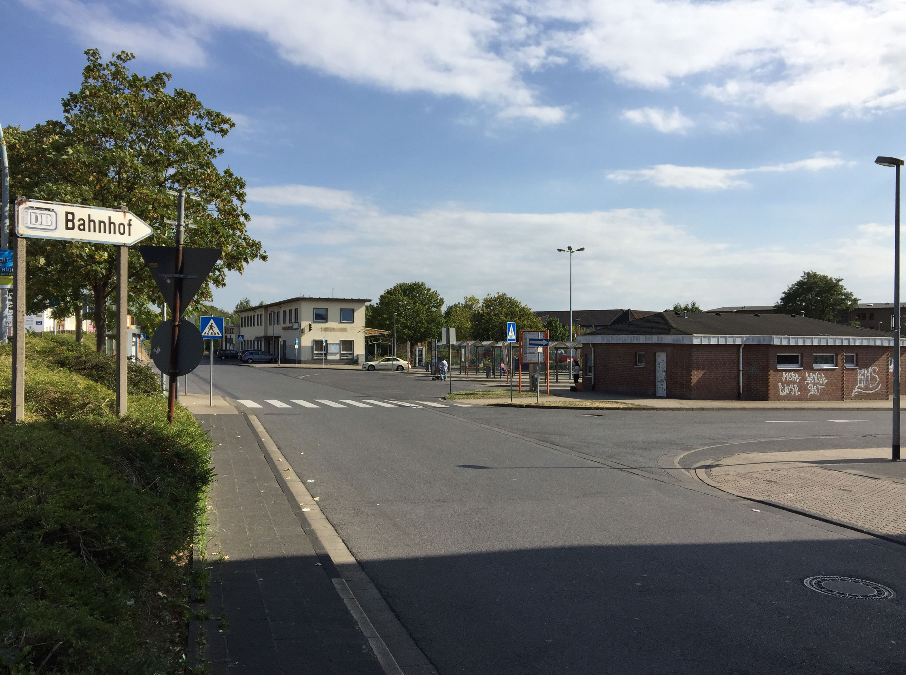 Dieses Bild zeigt den noch existierenden alten Bergheimer Bahnhof. Im Vordergrund, sieht man auch den Bergheimer Busbahnhof. Dieses Foto entstand im September 2016.